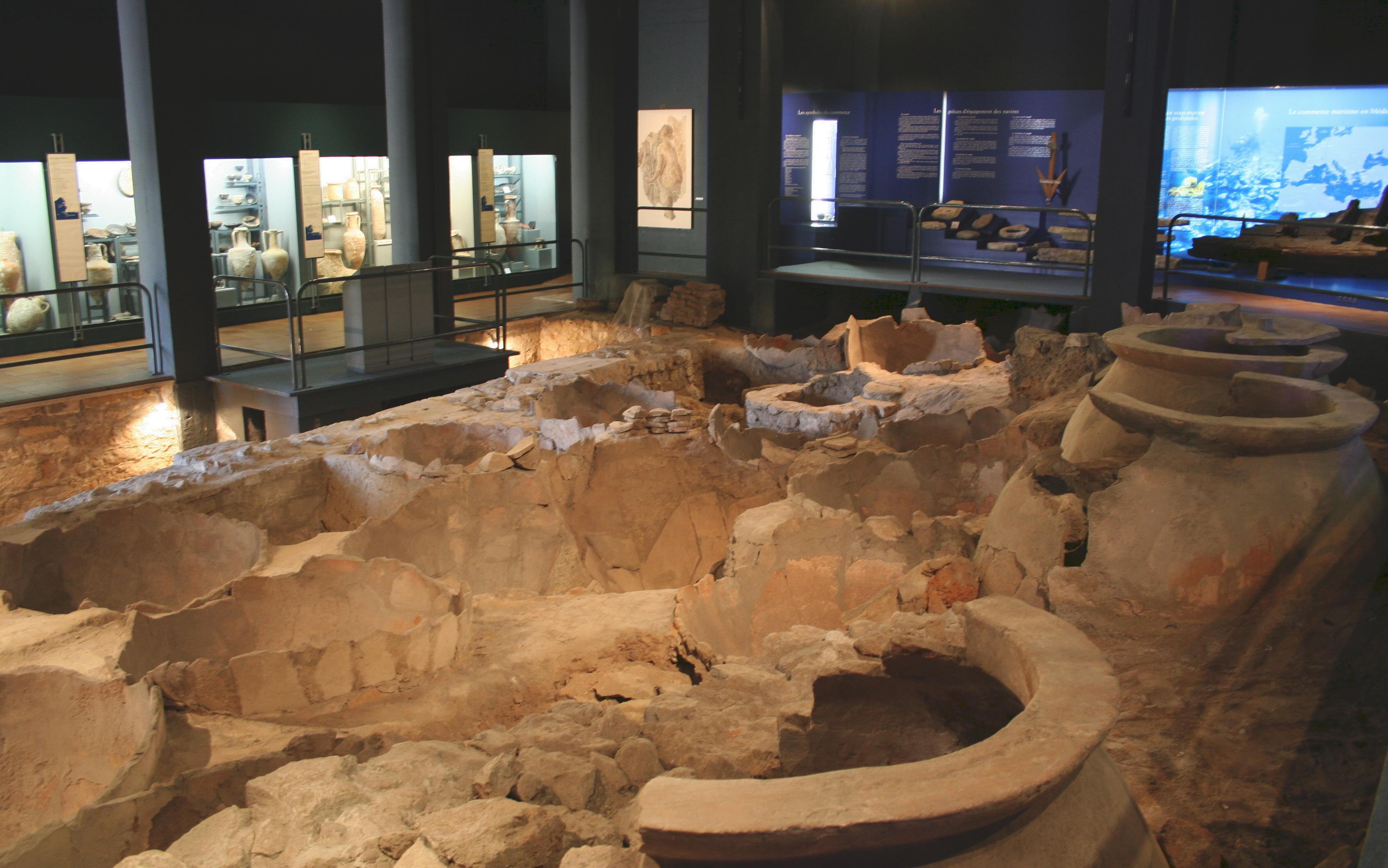 Musée des docks romains (Marseille), vue générale des dolia conservés in situ. .